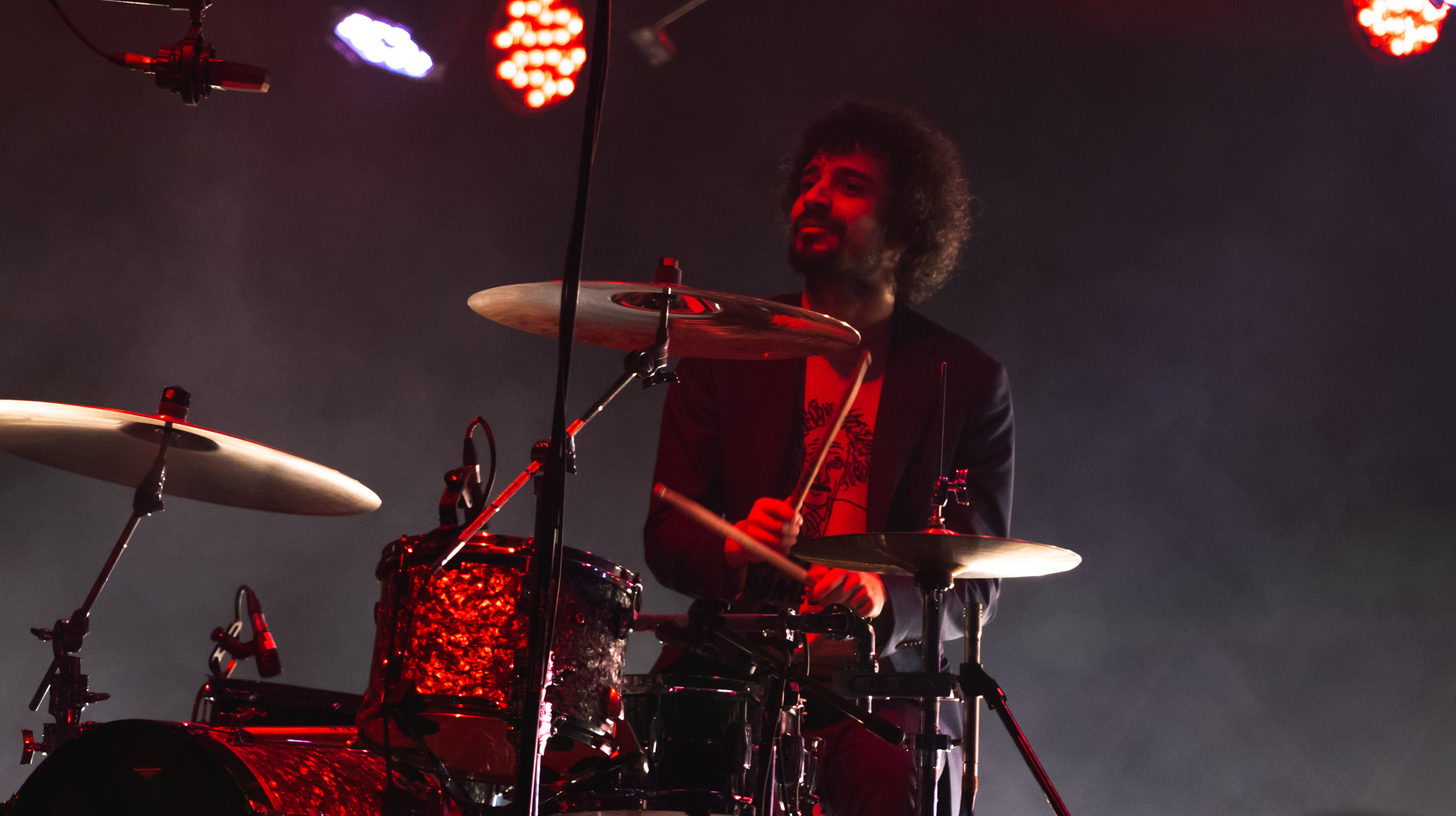 StrokesVivoLima231119-124